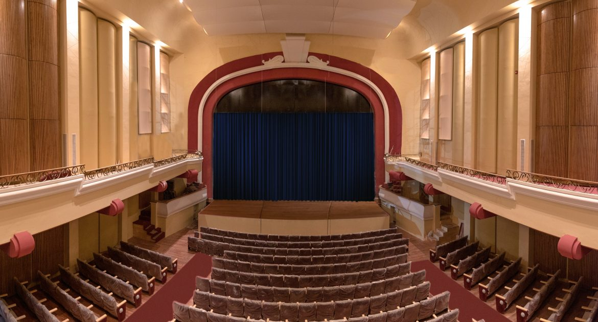 Interior renovado del nuevo teatro Mendoza que quedó inutilizado en el 2007 tras una grieta estructural grave.